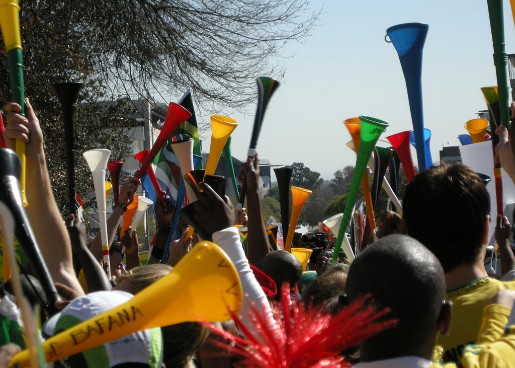 Vuvuzela Day